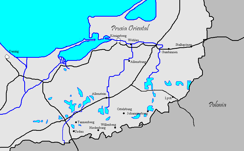 Hecho por Usuario:Mexicano en Paint